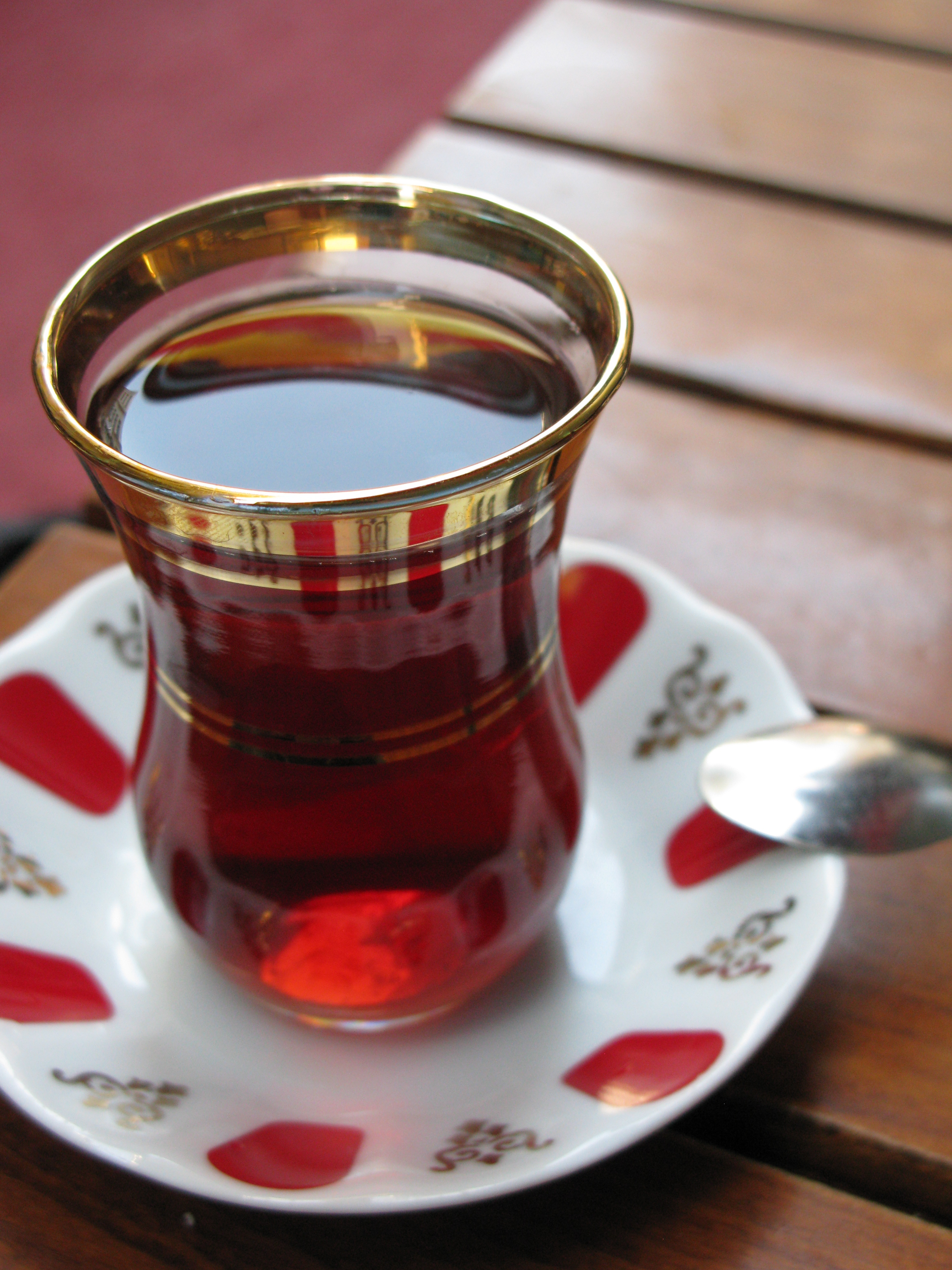 Turkish tea